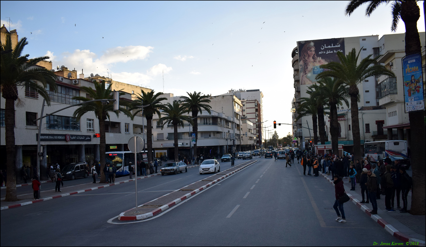 Meknes 49DSC_0239